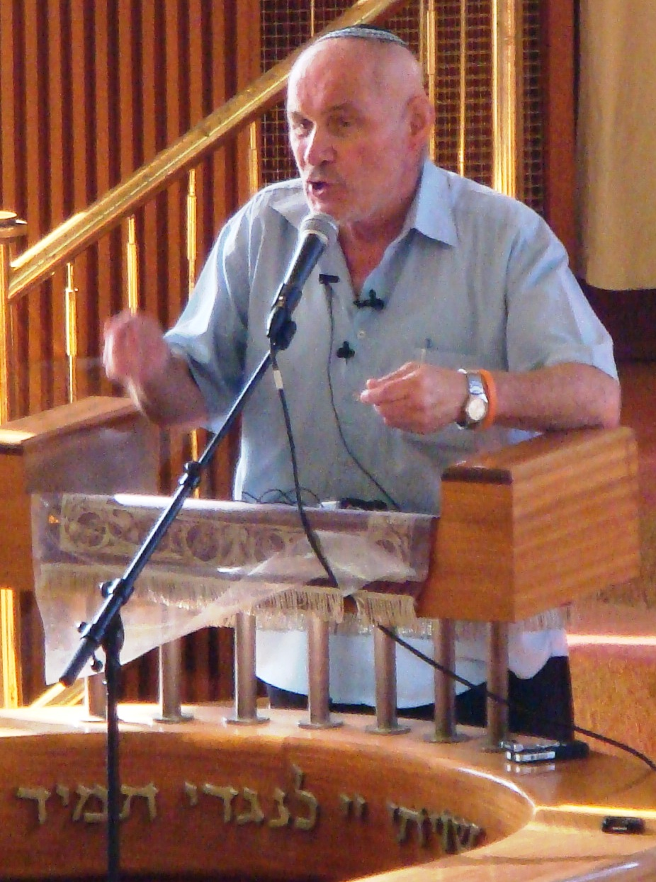 הרב חנן פורת ביום עיון לתנ"ך באלון שבות, ג' באב ה'תש"ע, 14ביולי 2010.